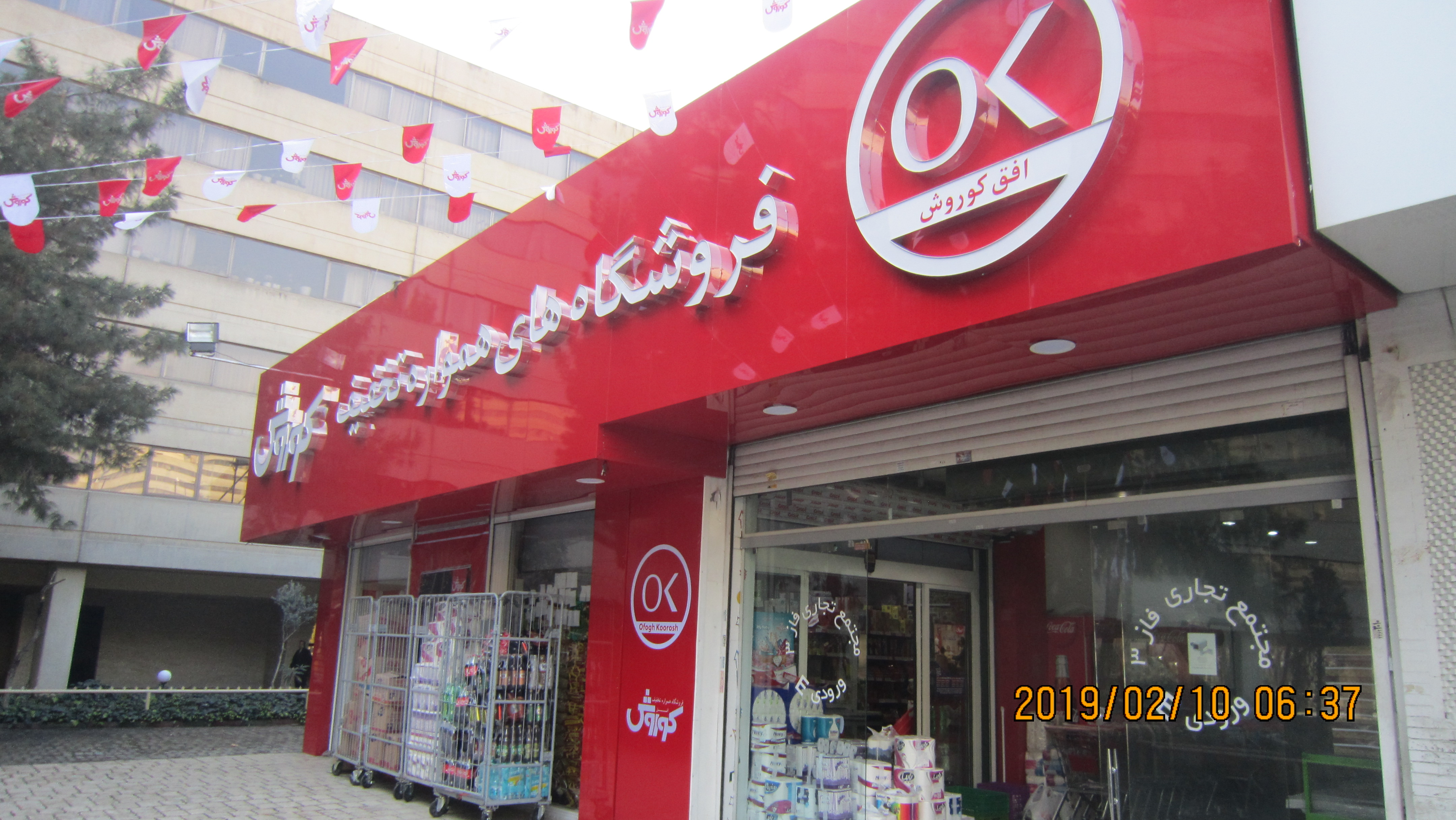 منطقۀ پنج، ناحیۀ شش، شهرک اکباتان